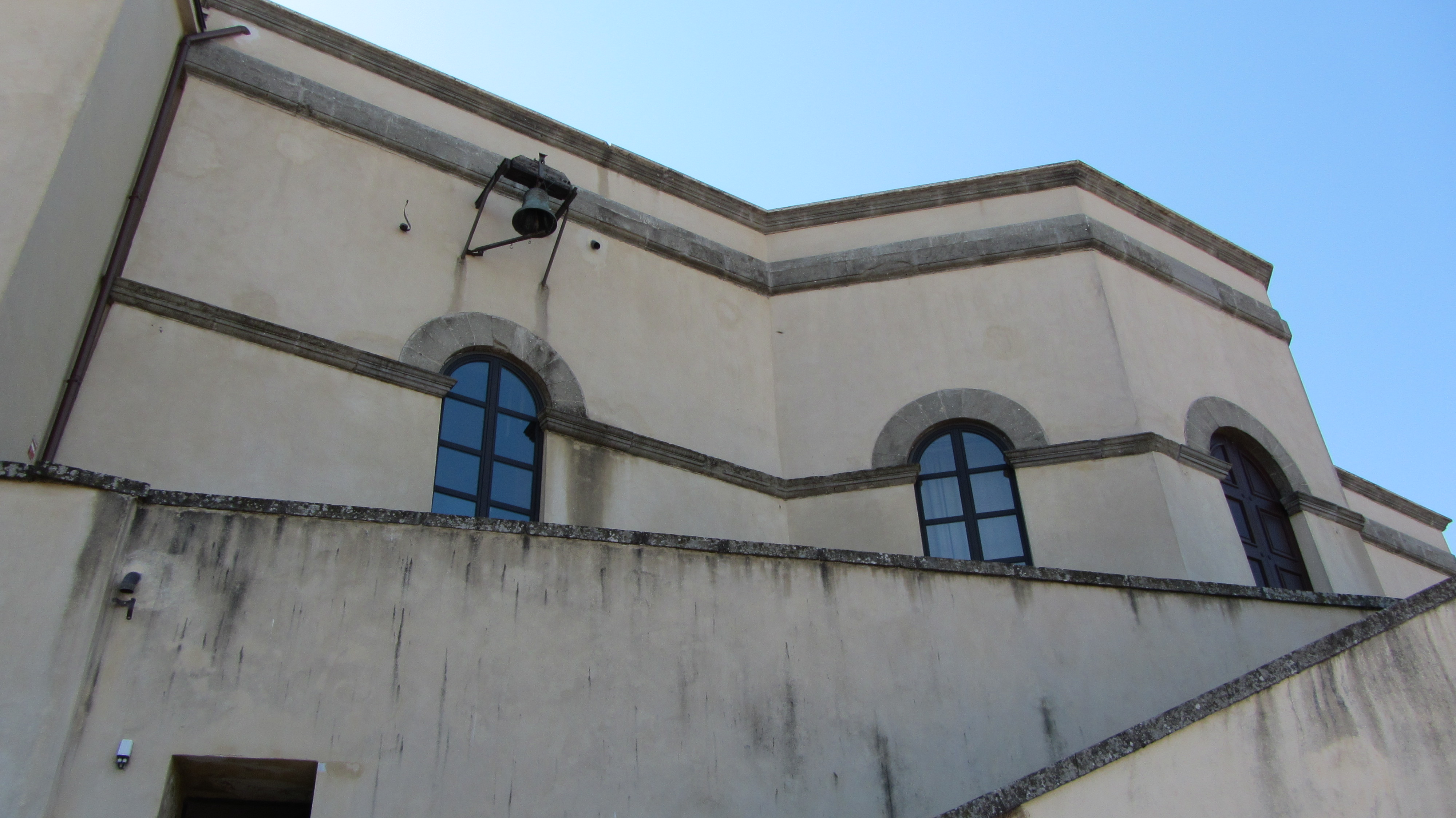 Scorcio del Museo di Geofisica di Rocca di Papa